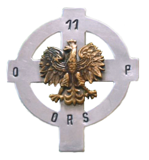 Jan Barniak "Wrzos" replika odznaki OP-11